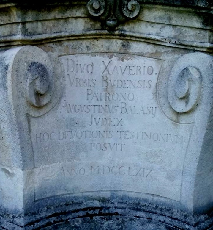 A Xavéri Szent Ferenc szobor talpazatán olvasható felirat – Budapest, XI. kerület. Budaörsi út 77. (Amerikai temető)